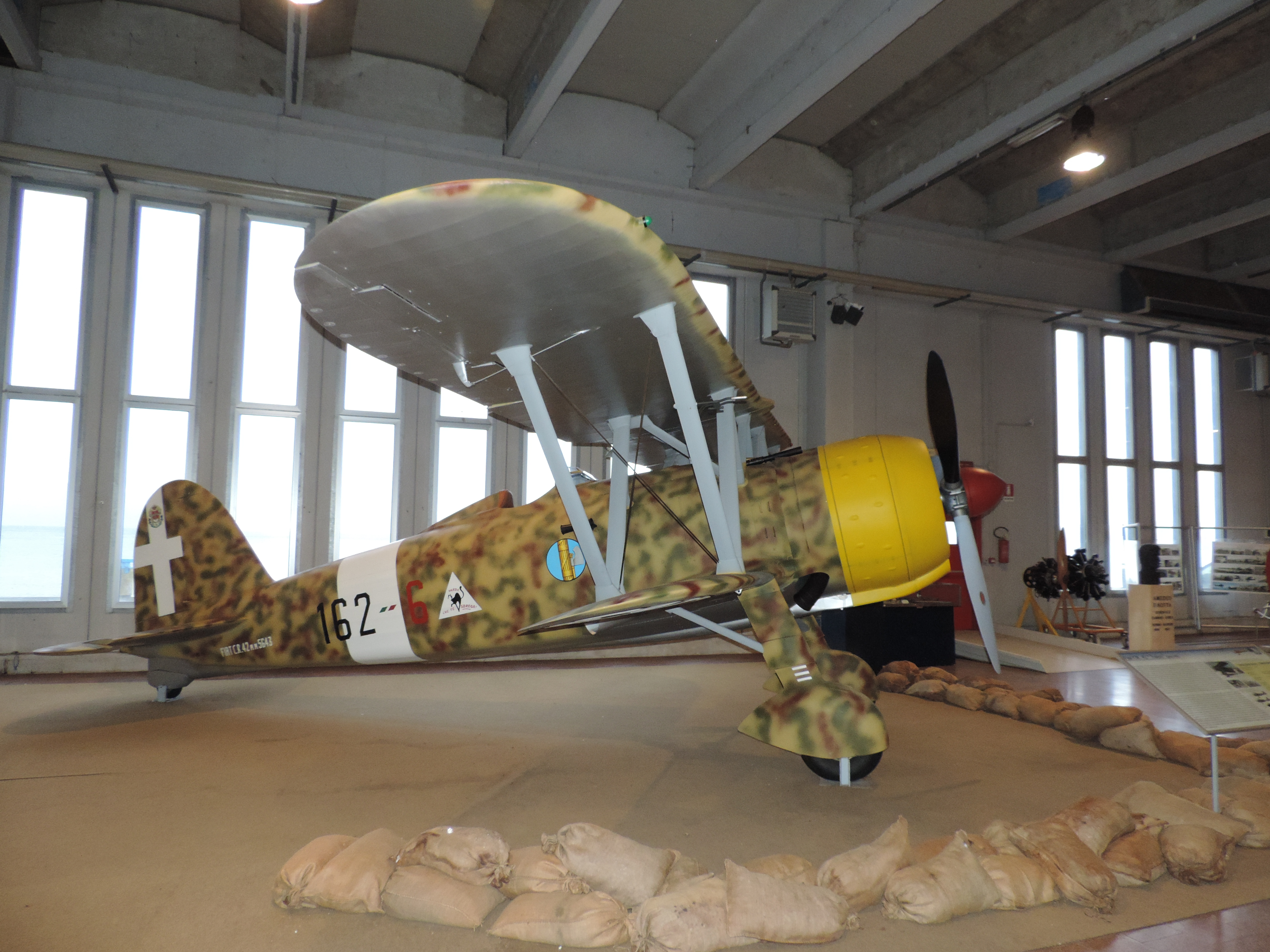 Fiat CR.42 im Luftwaffenmuseum Vigna di Valle